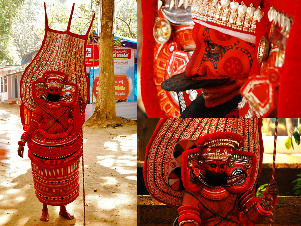 തൂവക്കാരി തെയ്യം, വേള : 18 ഫെബ്രുവരി 2012 - വാര്‍ഷികോത്സവം, സ്ഥലം: അണ്ടലൂര്‍ക്കാവ്